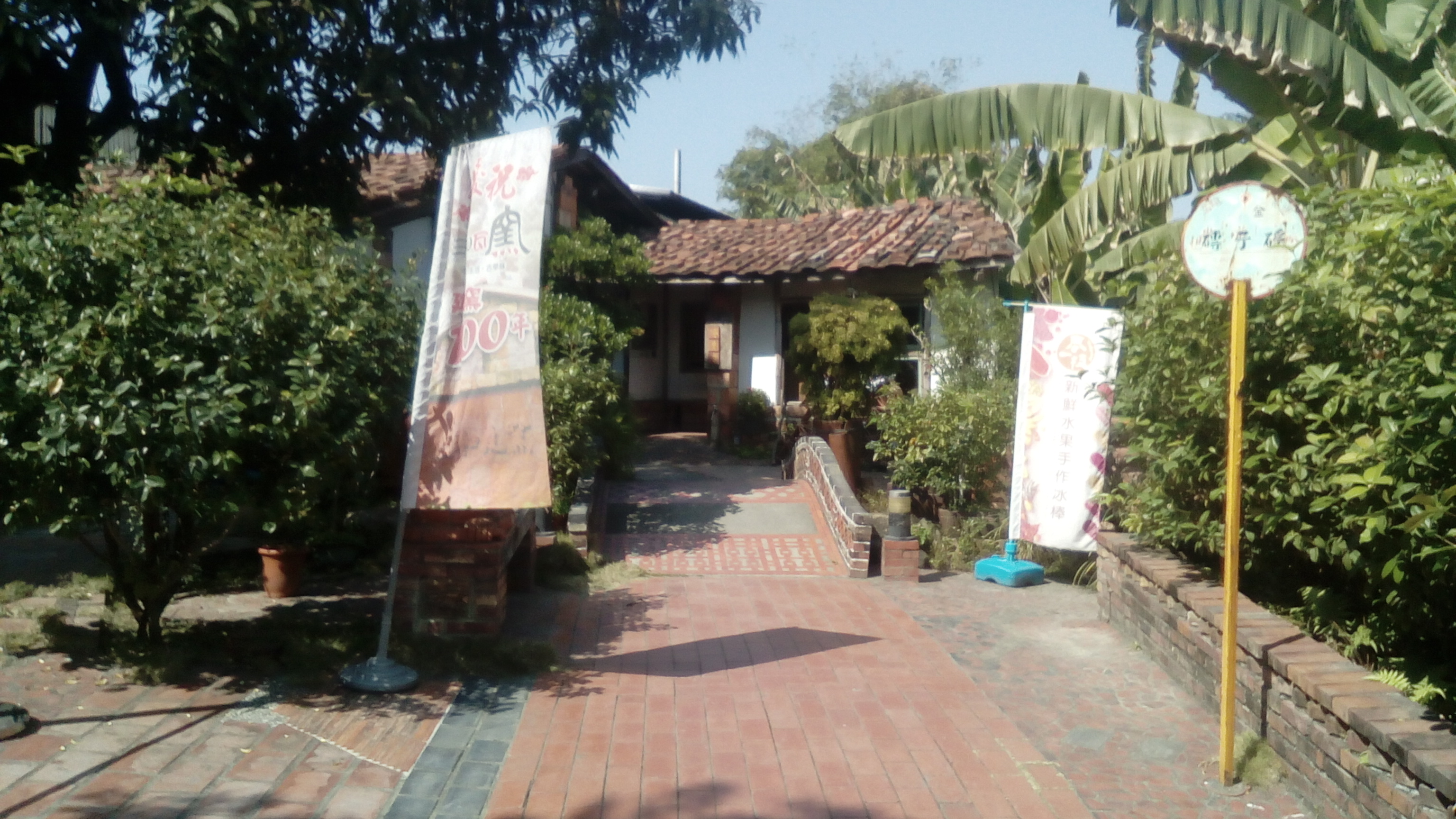 高雄市知名觀光景點 位於大樹區舊鐵橋公園內